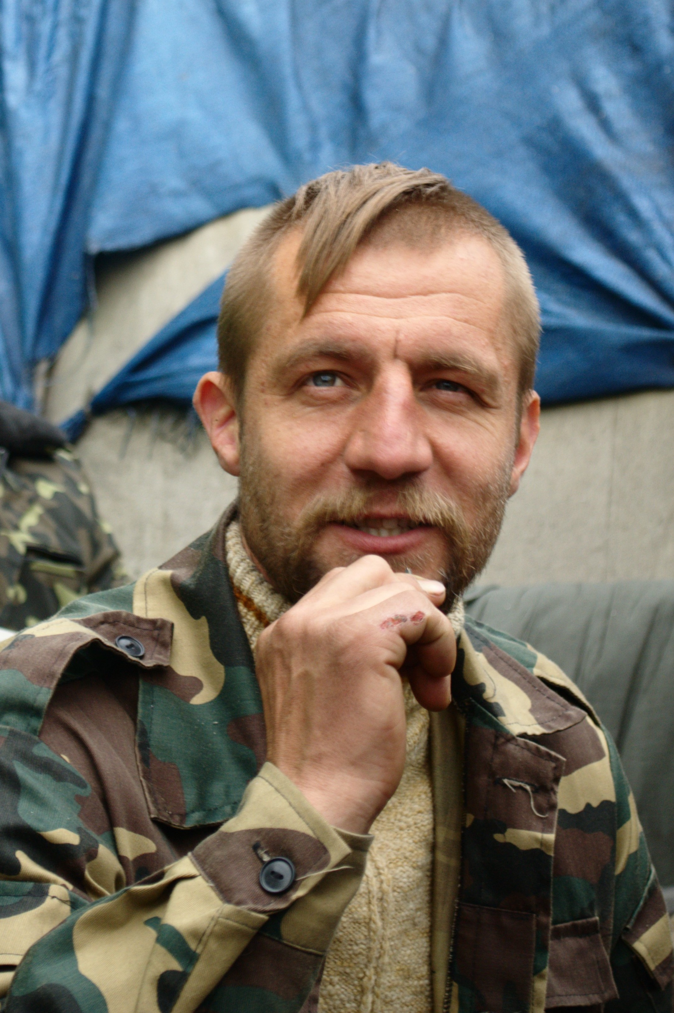 Myhailo_Gavryliuk.jpg: Михайло Гаврилюк, Майдан, квітень 2014 р.